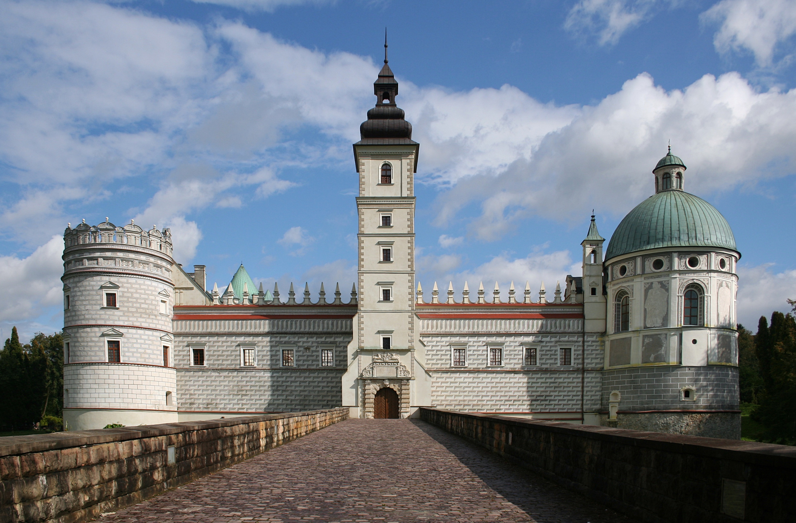 Zamek w Krasiczynie.